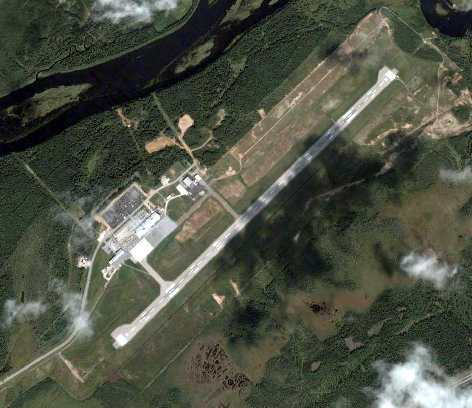 Deer Lake Airport (CYDF)